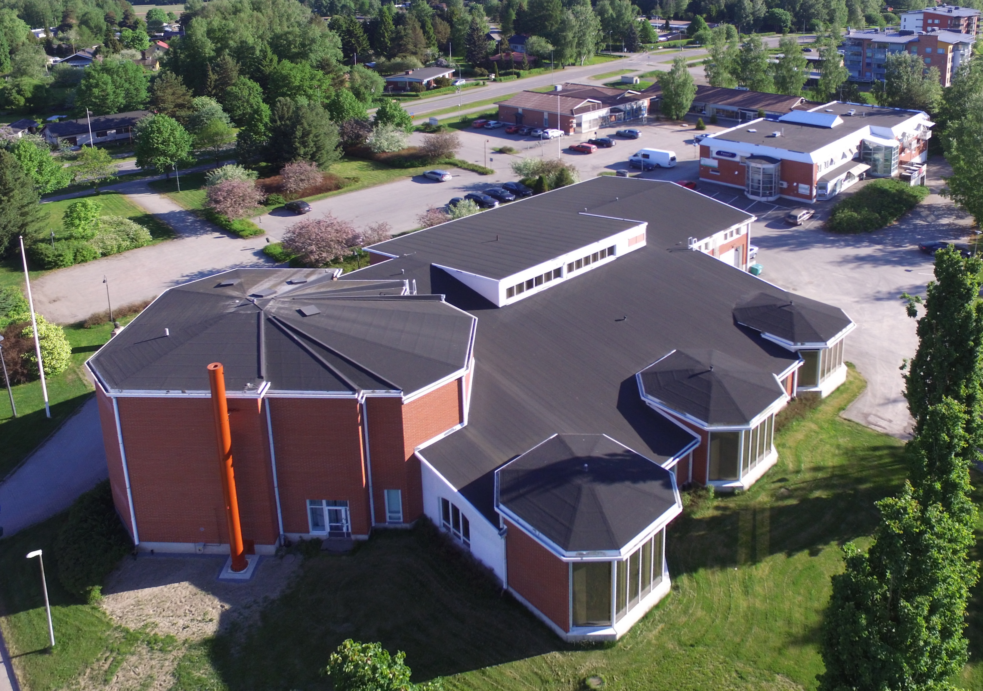 Juteinitalo sijaitsee Hattulan keskustassa Parolassa. Talosta löytyy muun muassa kirjasto.